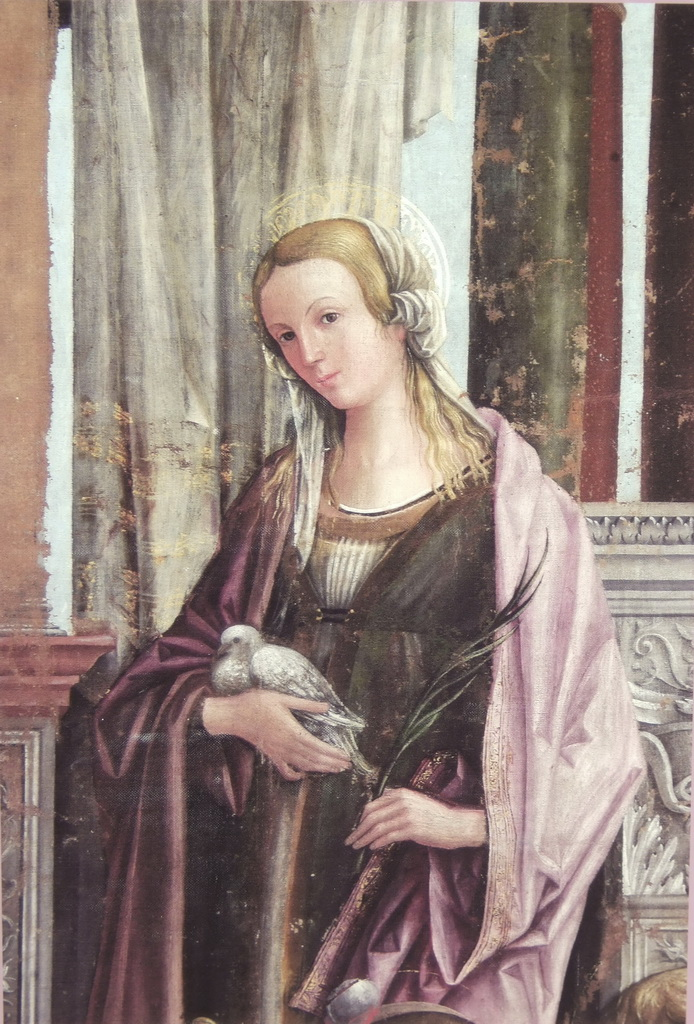 detail